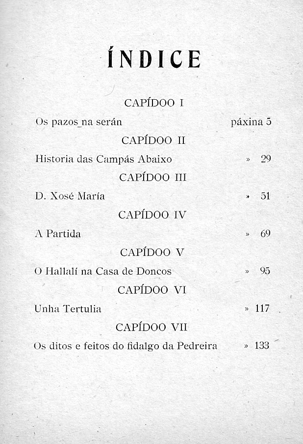 Os camiños da vida I. Os señores da terra. Índice